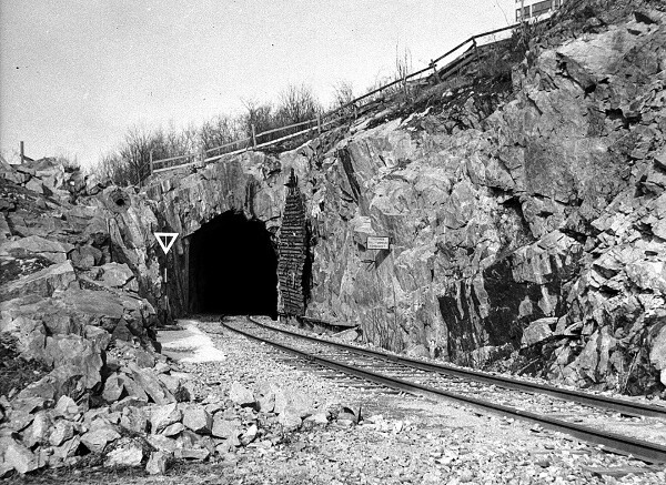 Tunnel Södersjukhuset 1940-tal